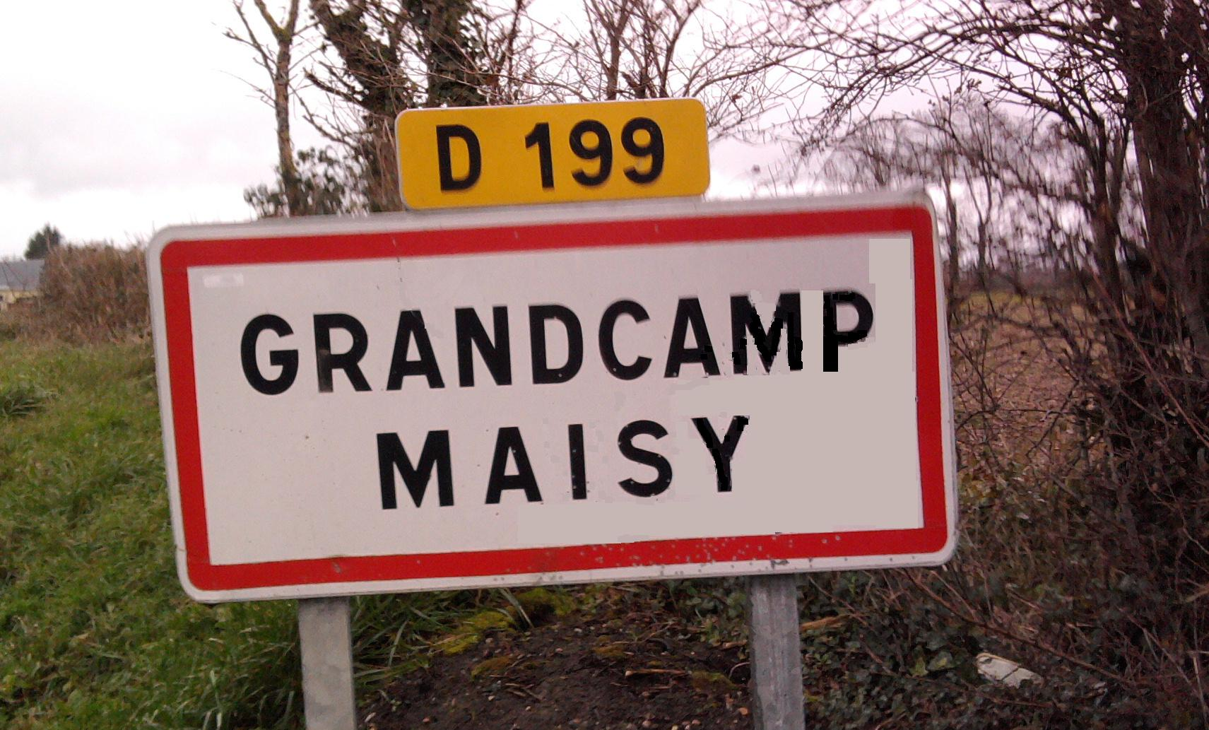 PANNEAU DE LA VILLE de Grandcamp-Maisy PAR RN13